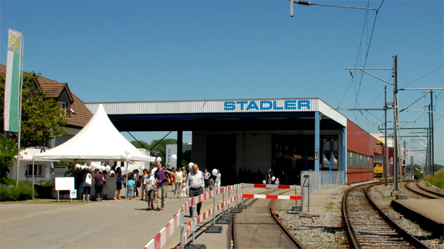 Opendag bij Stadler Rail in Bussnang (TG). Bij de vestigingen te Altenrhein (SG) en te Winterthur (ZH) was eveneens opendag.